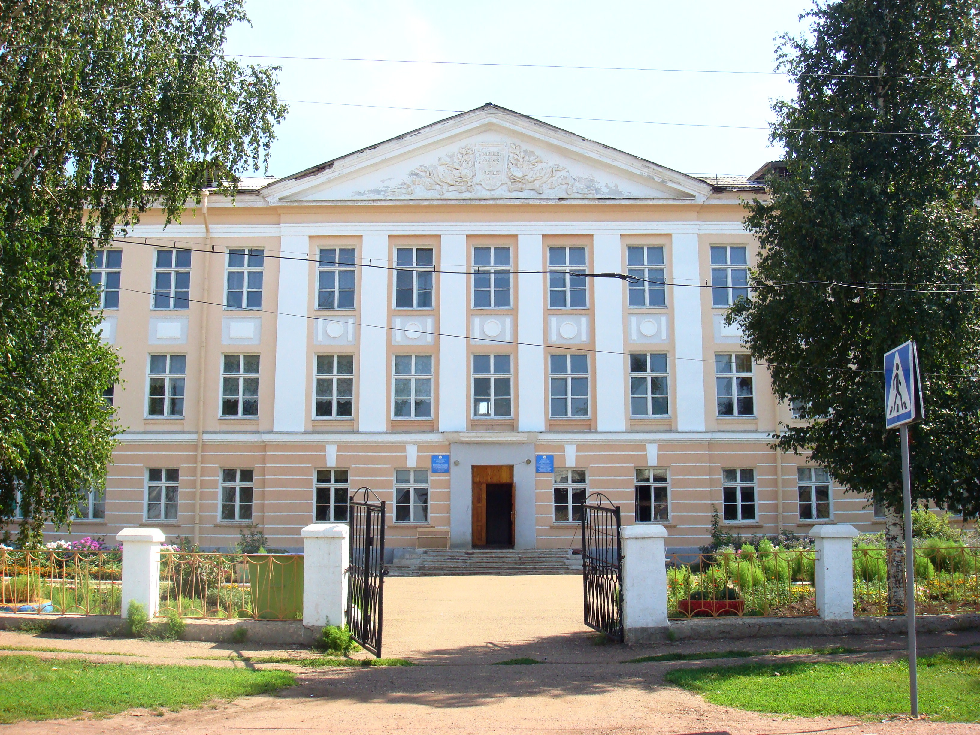 Школа № 5 в микрорайоне Перегонном города Ишимбая